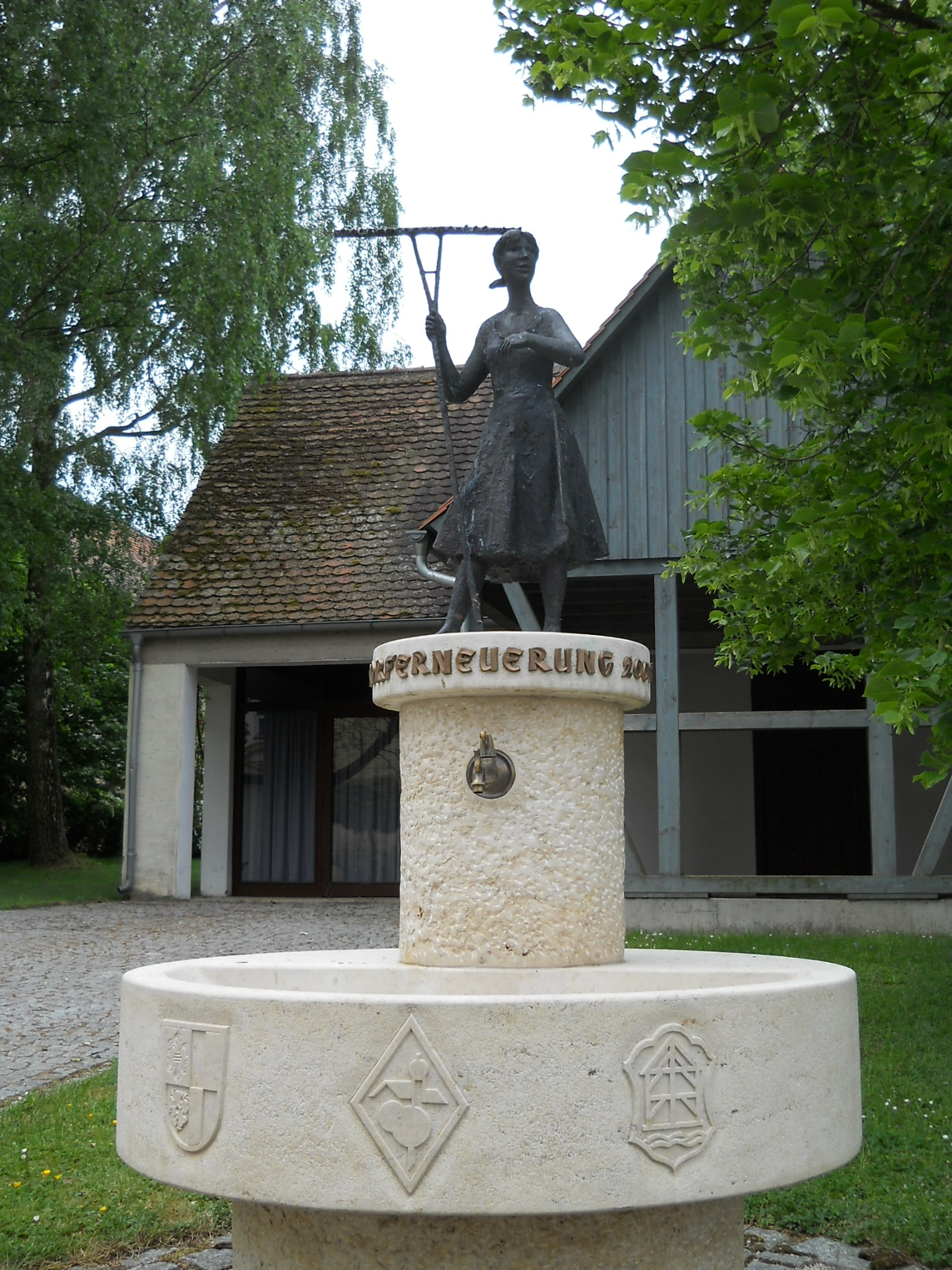 Dorfbrunnen in Aha, einem Ortsteil von Gunzenhausen im fränkischen Landkreis Weißenburg-Gunzenhausen